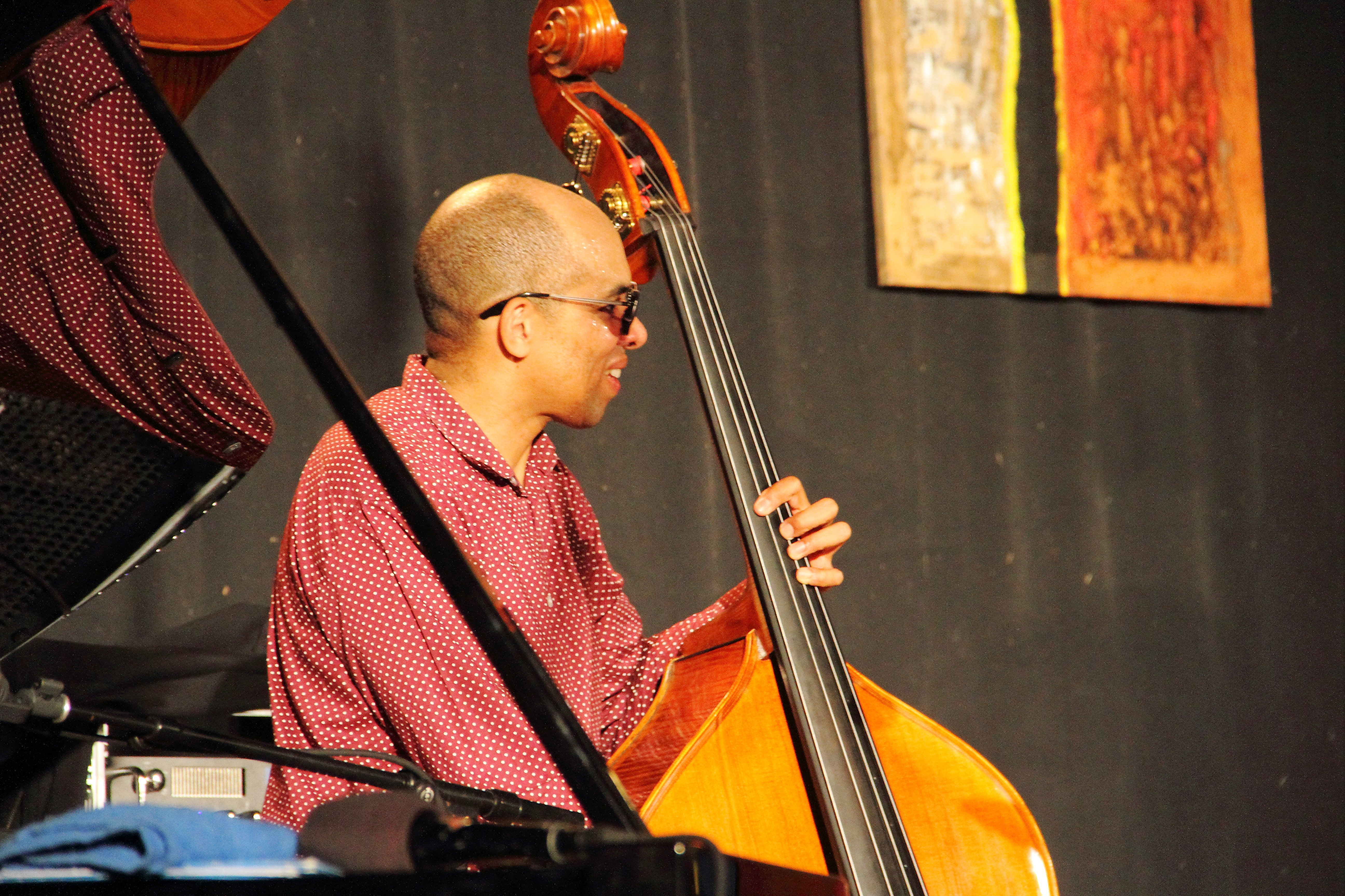 Das Kirk Lightsey / Don Moye Trio auf dem INNtöne Jazzfestival 2017.